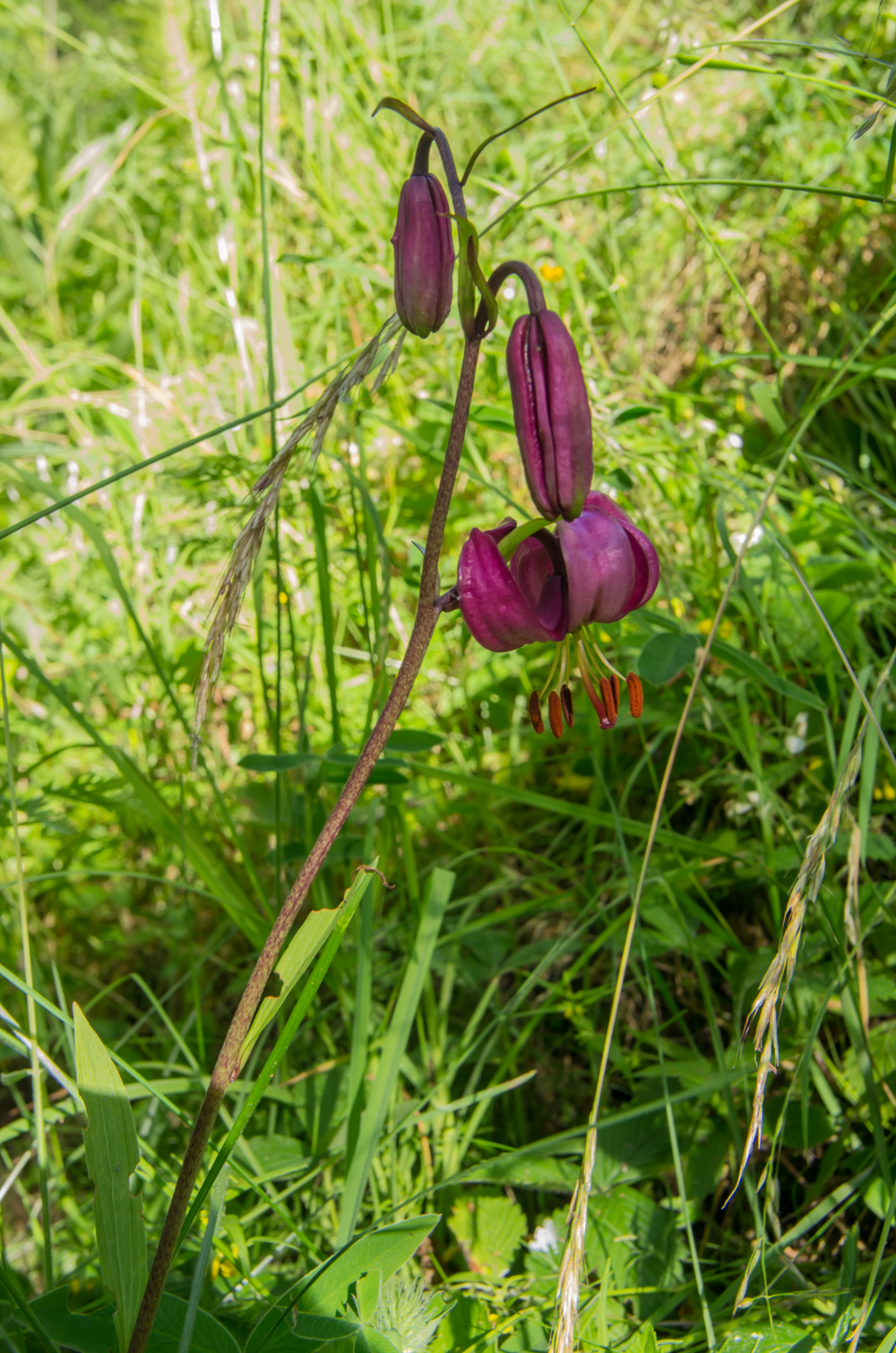 Lilie zlatohlavá na lokalitě Přírodní památky Homolka, Chodov u Bečova nad Teplou, Slavkovský les, okres Karlovy Vary